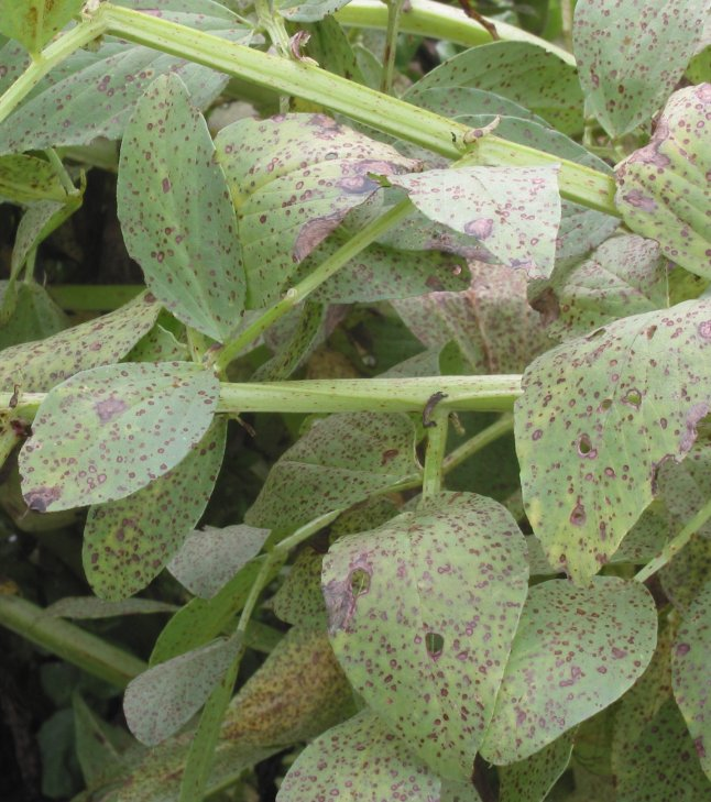 Vicia faba (Tuinboon) choladevlekkenziekte (Botrytis spp)